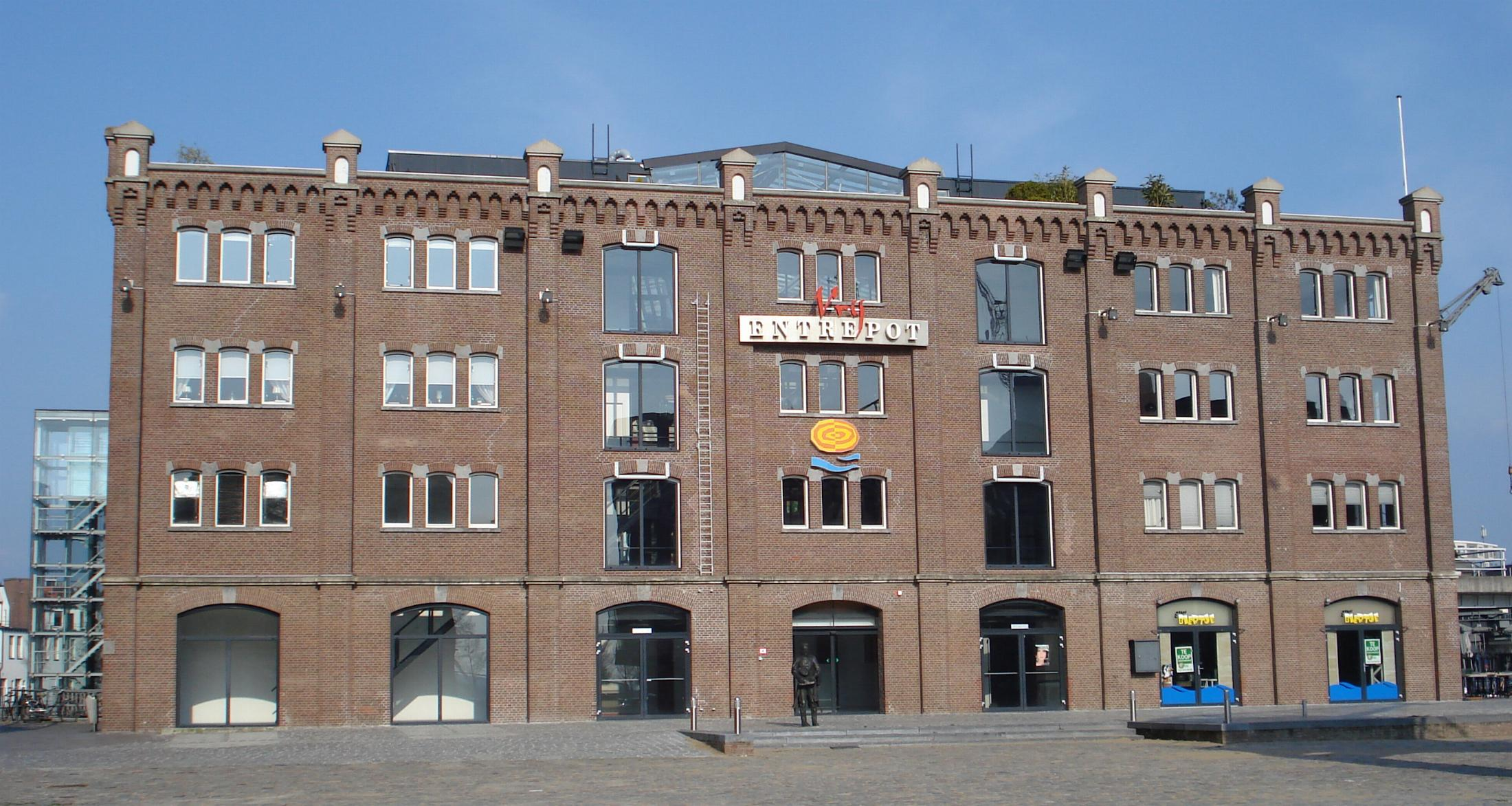 Rotterdam, Handelsplein 1-125. Vrij entrepot. Rijksmonument.